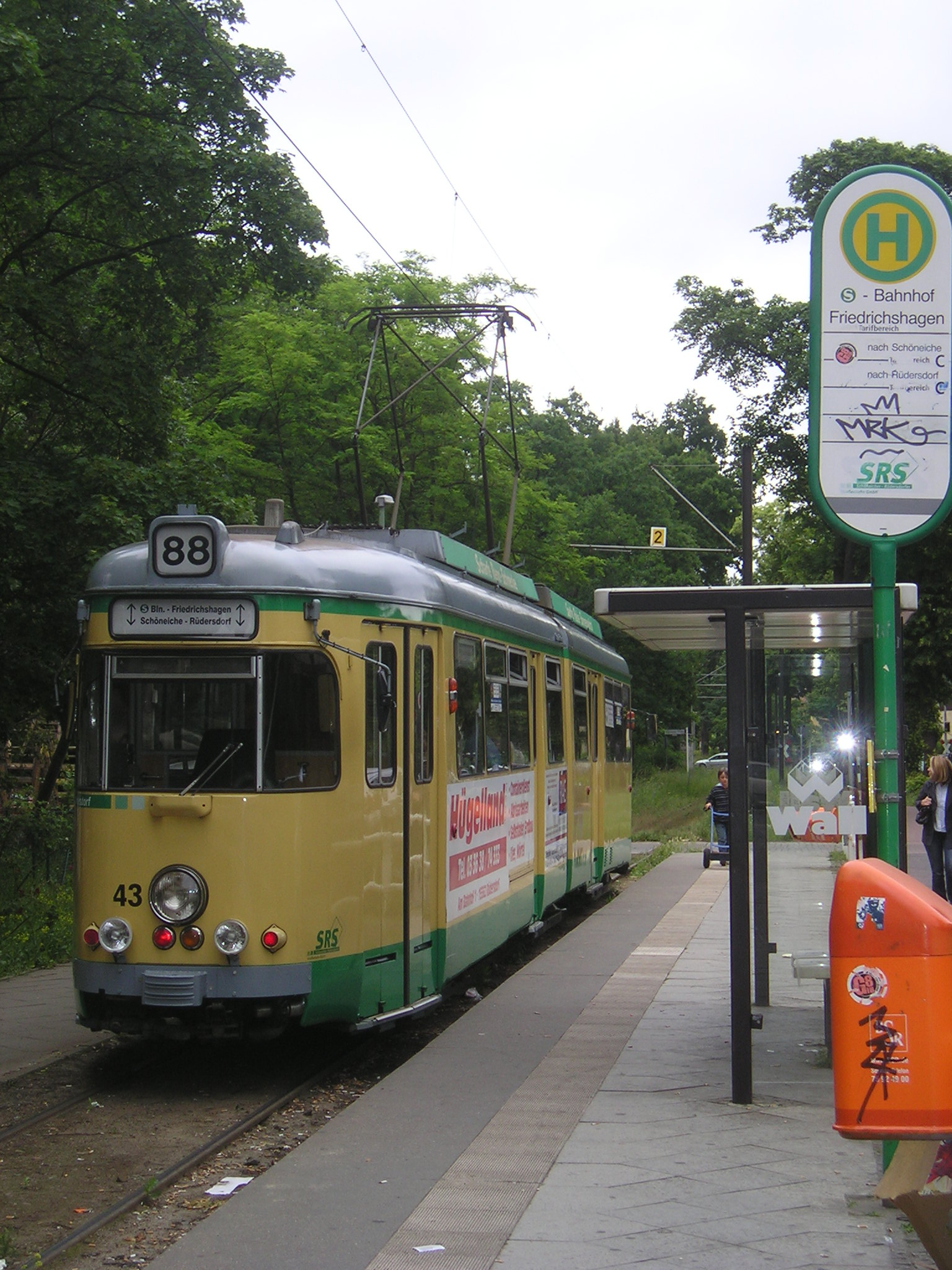 Endschleife "S-Bhf. Friedrichshagen" der Schöneicher-Rüdersdorfer Straßenbahn